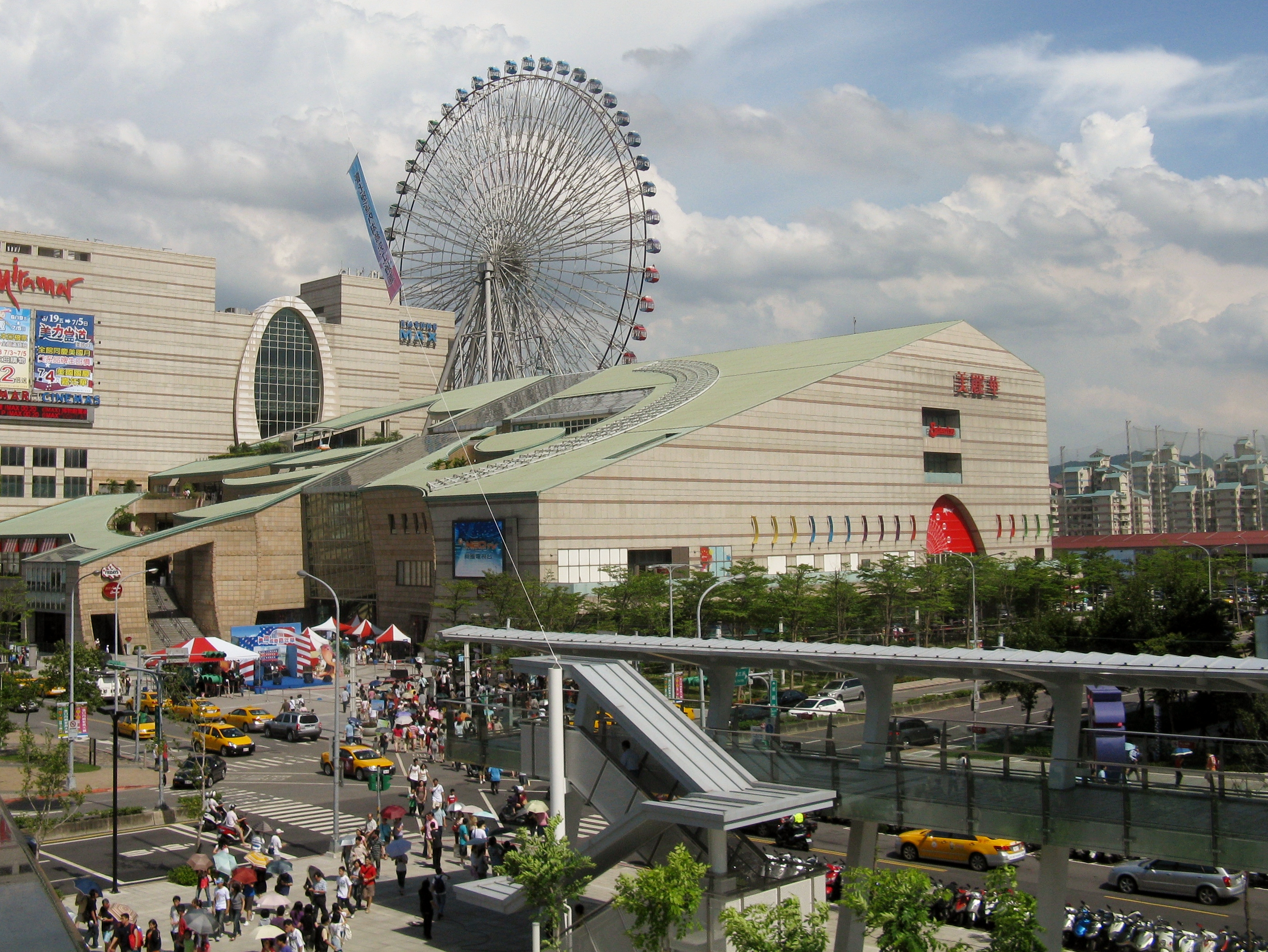 中文（台灣）: 臺北捷運內湖線開業日下午，美麗華百樂園入口前。